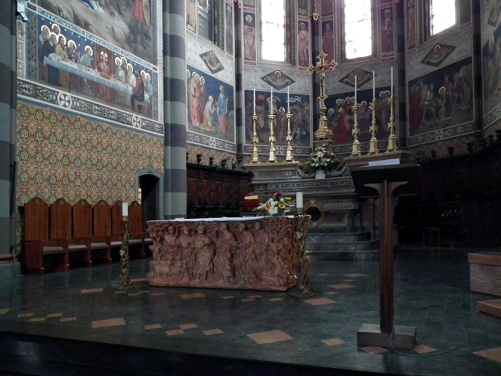 Pinerolo Cathedral San Donato Native nameDuomo di PineroloLocationPinerolo, ItalyCoordinates44° 53′ 08″ N, 7° 19′ 48″ E WebsiteParrocchia di San Donato nella CattedraleAuthority control : Q743305